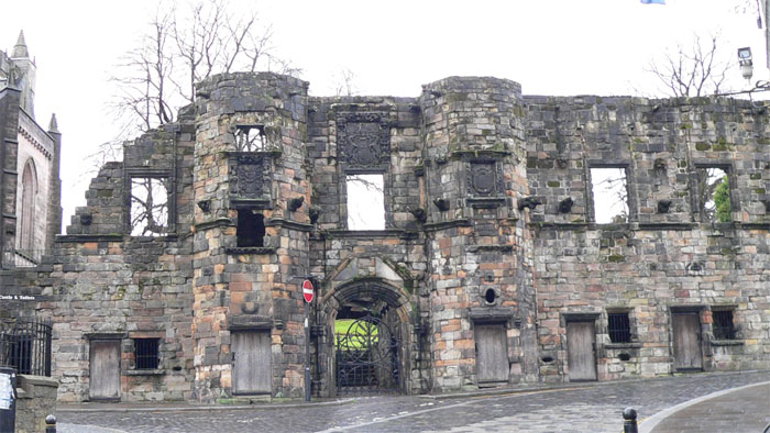 Mar's Wark, Stirling (Scotland)